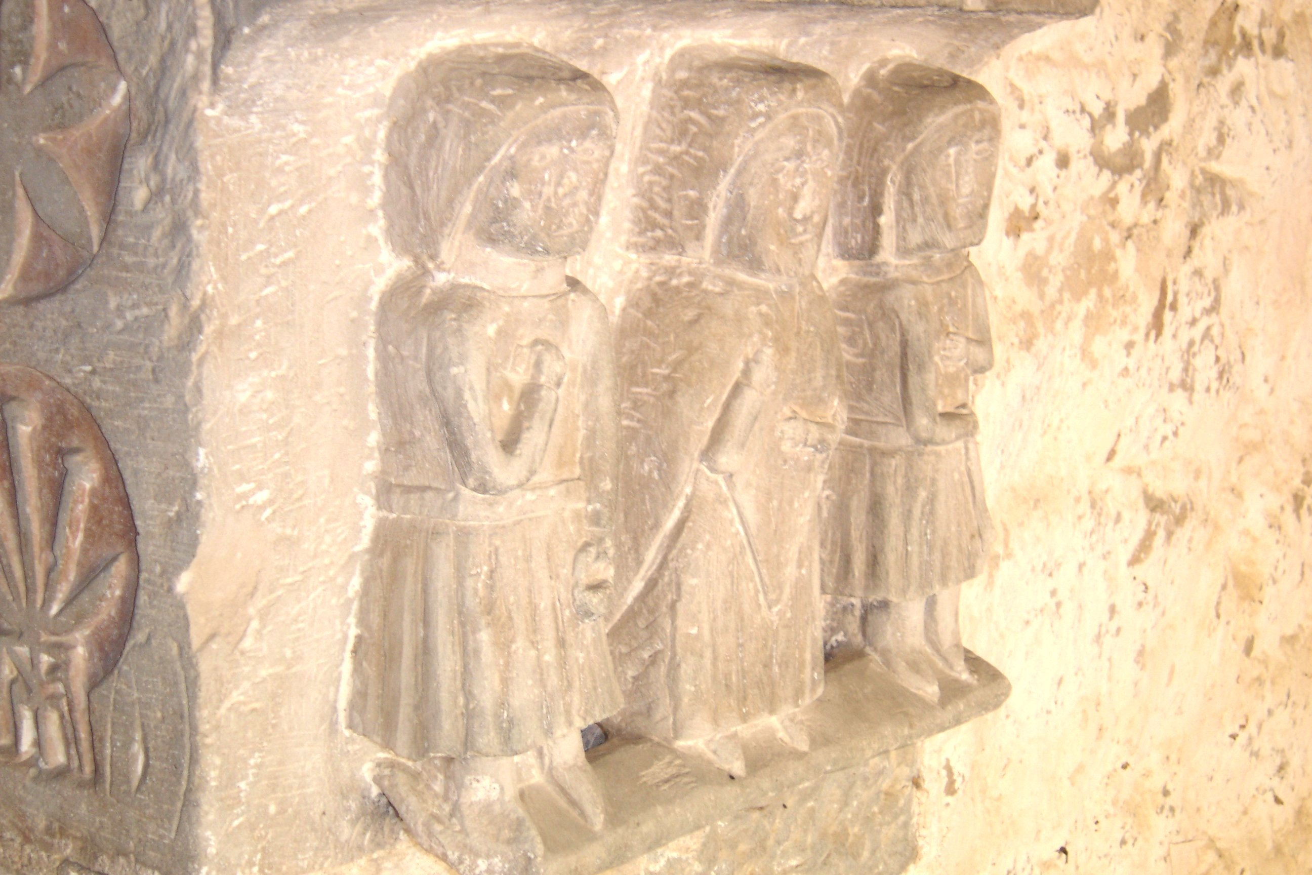 L'ermita de Sant Lleïr de Casabella, al municipi de La Coma i la Pedra, a la Vall de Lord (Solsonès). El grup escultòric de la dreta de la poertalada vist des d'una altra perspectiva